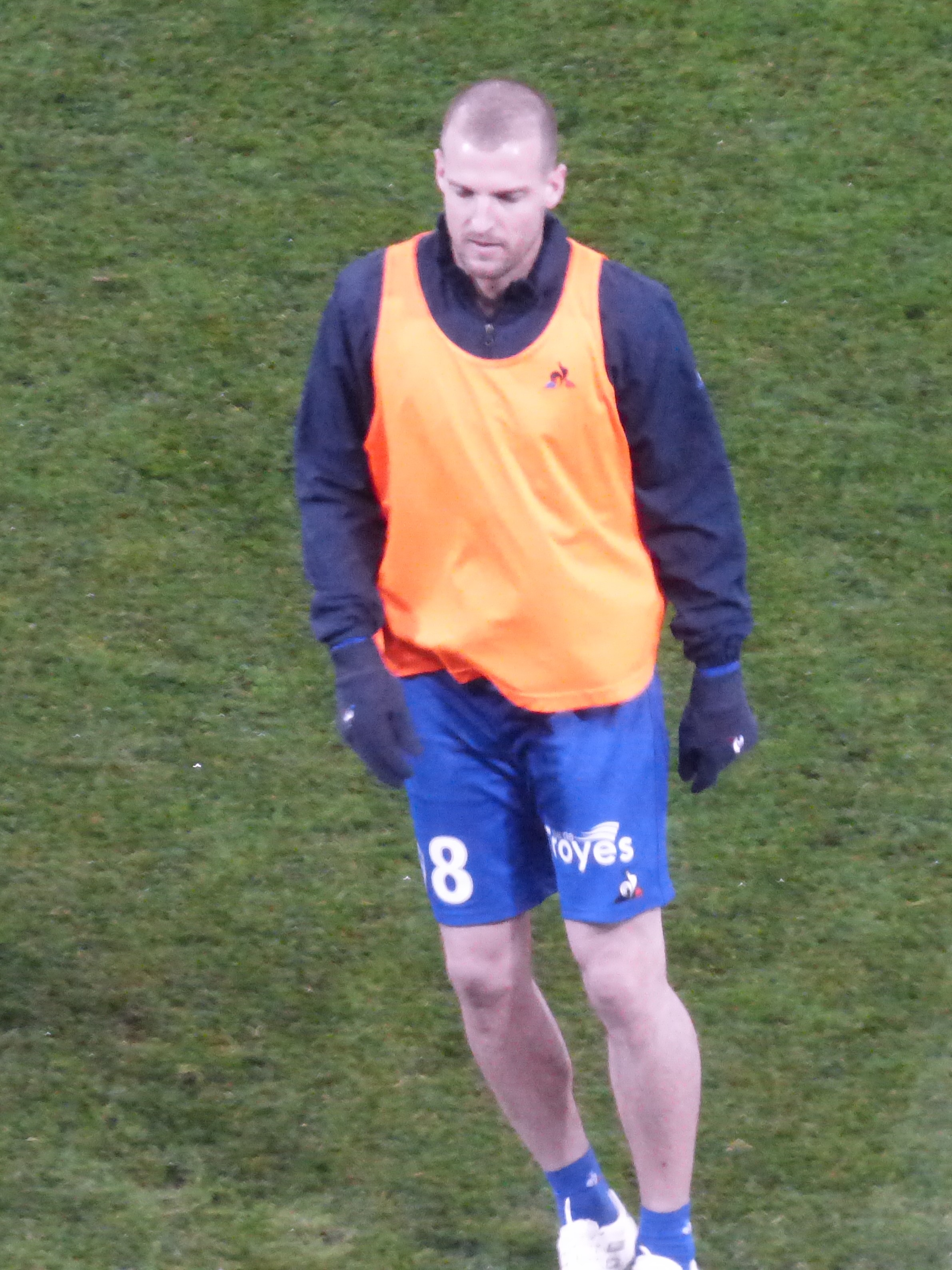 Stéphane Darbion lors du match RC Lens / ES Troyes AC, comptant pour la vingt-troisième journée du championnat de France de football de Ligue 2 2019-2020, le 4 février 2020, au Stade Bollaert-Delelis de Lens